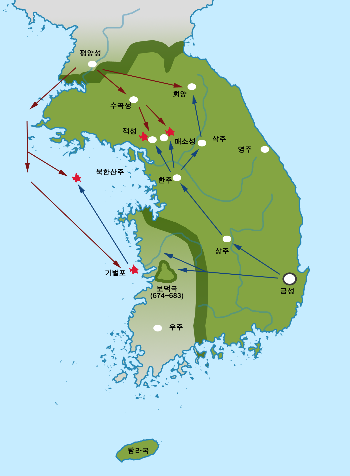 조선말: 나당전쟁과 보덕국